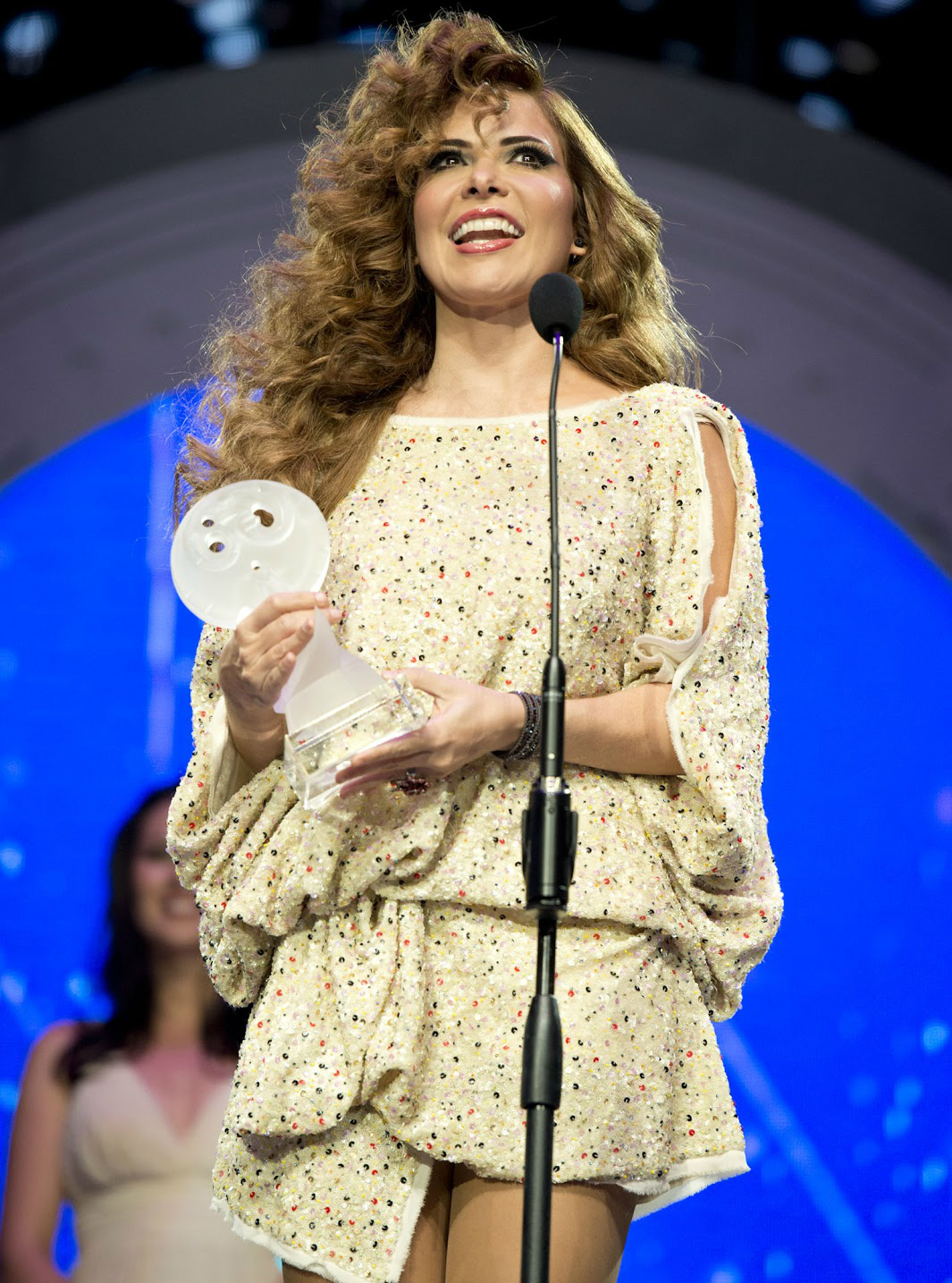 Gloria Trevi Luna del auditorio nacional.